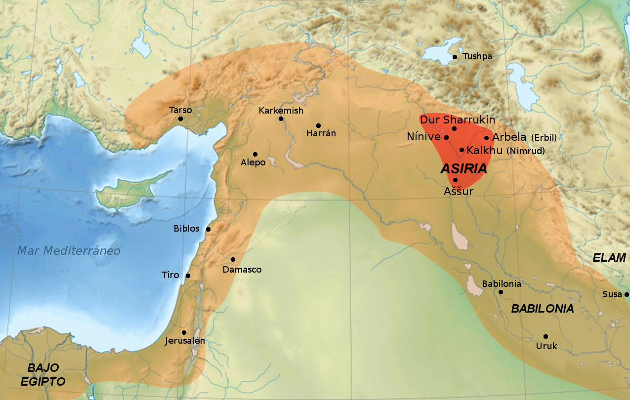 En rojo: el corazón del imperio asirio, con las principales ciudades asirias. En naranja: la extensión máxima del imperio bajo el reinado de Assurbanipal (668-627 aC).